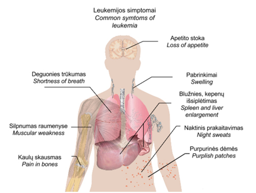 Kvėpavimo nepakankamumas – tai neadekvati dujų apykaita plaučiuose, dėl kurios trūksta deguonies, o anglies dioksidas iš jo pasišalina nepakankamai. Silpnumas raumenyse - simptomas, pasireiškiantis periodiniu praeinančiu raumenų silpnumu ir patologiniu jų nuovargiu. Dažniausias simptomas yra kaulų skausmas ypač judant. Pacientai gali skųstis sausgyslių patempimo, sąnarių skausmais, kurie dar vadinami augimo skausmais. Alkio nebuvimas, jo nejautimas. Pabrinkimai – tai skysčio pertekliaus susikaupimas audiniuose. Jie tampa pastebimi, kai šių skysčių kiekis organizme viršija porą litrų. Organų padidėjimas atsiranda dėl to, kad jie bando kompensuoti kaulų čiulpuose sutrikusią kraujodarą (pavyzdžiui, sergant pirmine mielofibroze). Kepenų ir blužnies padidėjimas nustatomas čiuopiant šiuos organus arba atliekant jų echoskopiją. Purpurinės dėmės - atsiranda kai kai kyla ir krenta kūno temperatūra bei susilpnėja kraujagyslės.